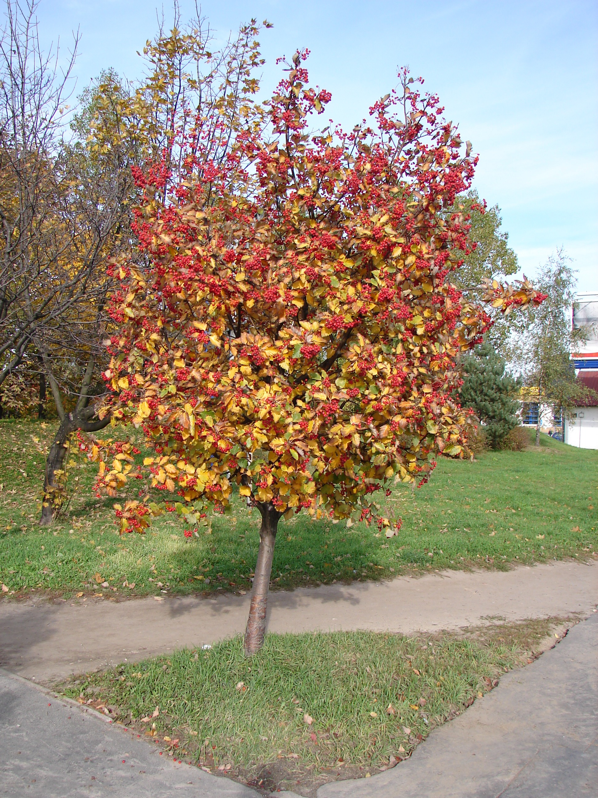 Sorbus intermedia (jarząb szwedzki) - owłosiony spód liścia, Warszawa-Ursynów